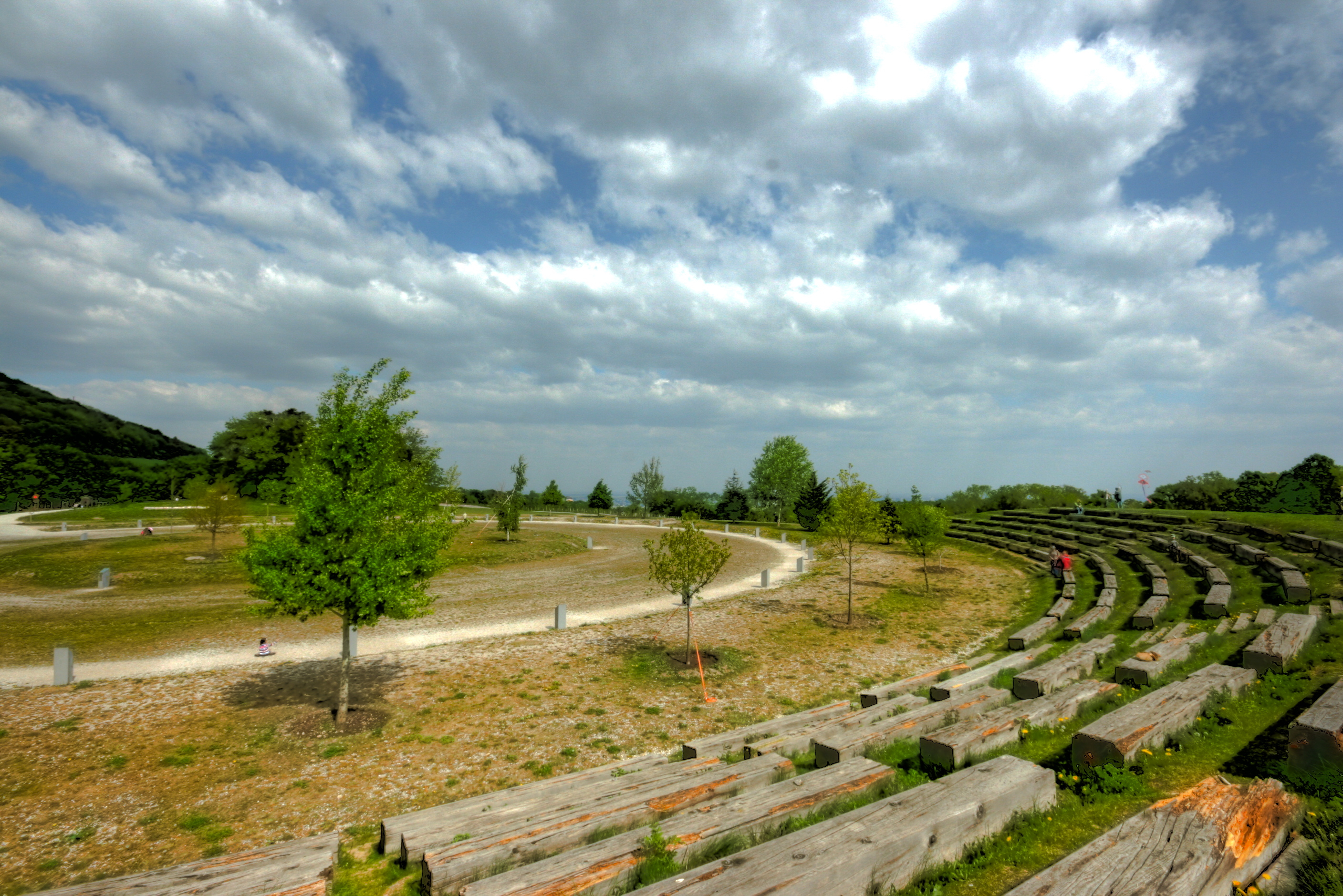 Keltischer Lebensbaumkreis am HImmel